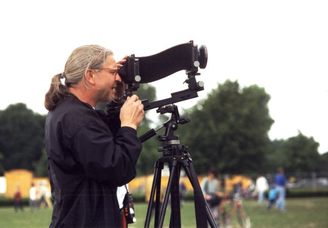 Fachkamera, dieses Bild entstand im Juni 1995 während der Verhüllung des Berliner Reichstags durch Christo. Es zeigt den Fotografen Rudolf Schäfer mit einer ArcaSwiss Fachkamera, die auf einem stabilen Stativ aufgebaut ist. Vor seinem Bauch hängt ein Hand-Belichtungsmesser, den man in solchen Situationen immer braucht, zumal eine Fachkamera keinen eingebauten Belichtungsmesser hat. Die Kamera ist so verstellt, dass stürzende Linien bei der Aufnahme des verhüllten Reichstags vermieden werden.